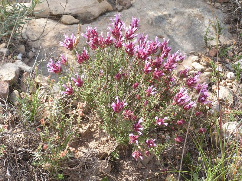 Thymus moroderi, Cantueso, Cantahueso. Vista completa de la planta en flor, sobre suelo calizo. Imagen tomada en Mayo de 2006, en la Sierra de Elche.